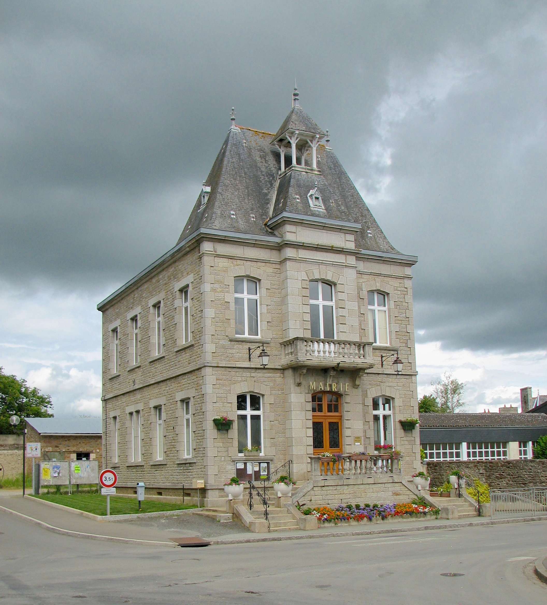 Mairie d'Evran (Côtes d'Armor)